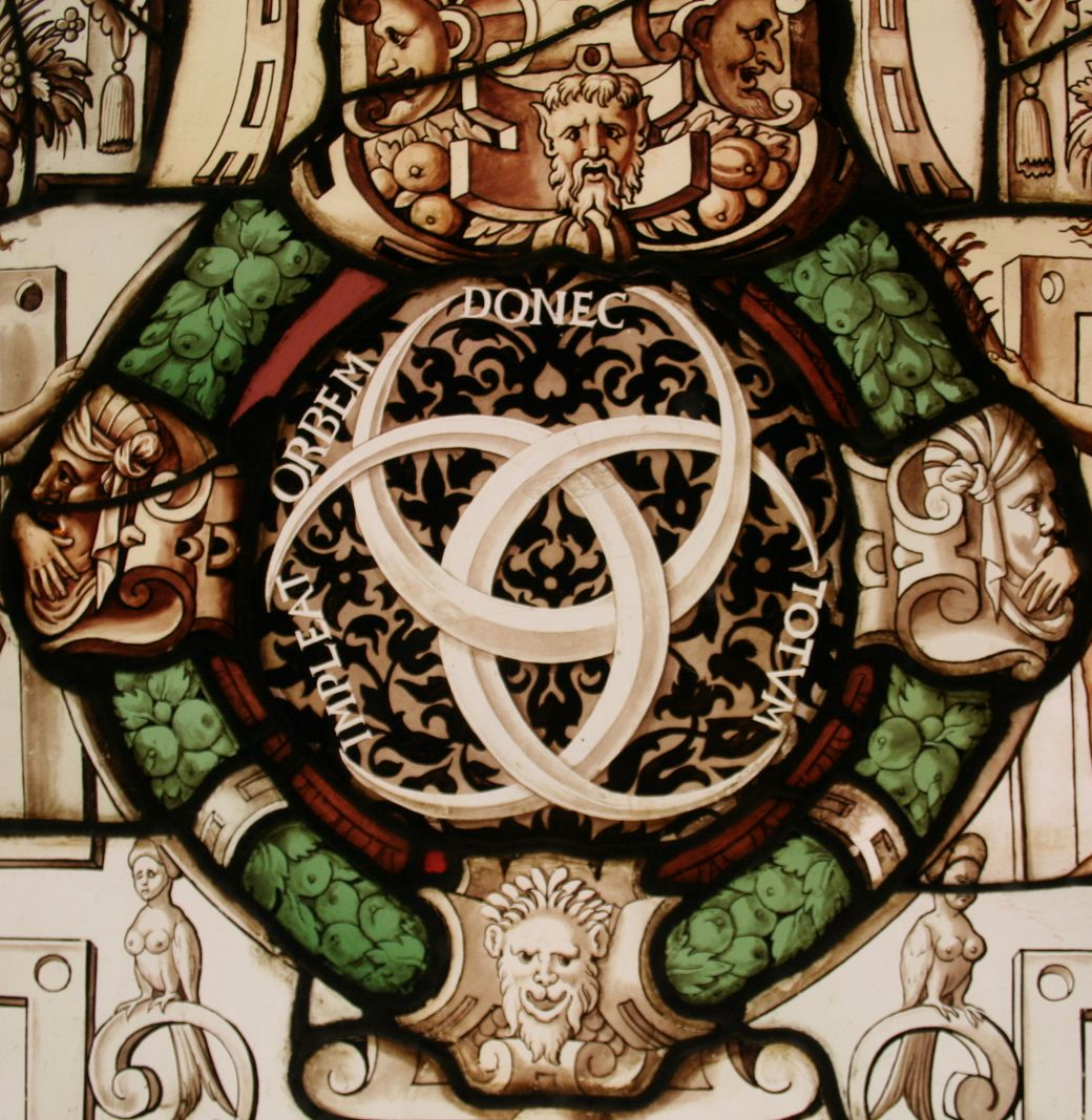 Devise aux croissants du roi Henri II (1547-1559), vitrail d'époque conservé au Château d'Ecouen, Musée national de la Renaissance.